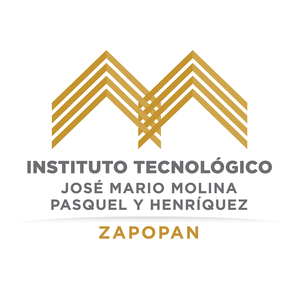 Logo Oficial Tec MM Campus Zapopan